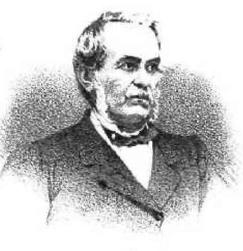 Griechischer Politiker, 19. Jahrhundert